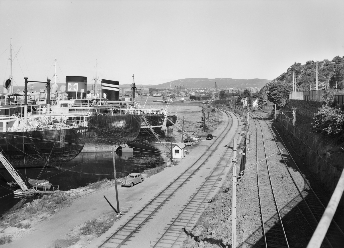 Skip i opplag ved Kongshavn, muligens på 1960-tallet. Østfoldbanen med havnespor ved siden av. Kongshavns gamle bebyggelse der jernbanen svinger.